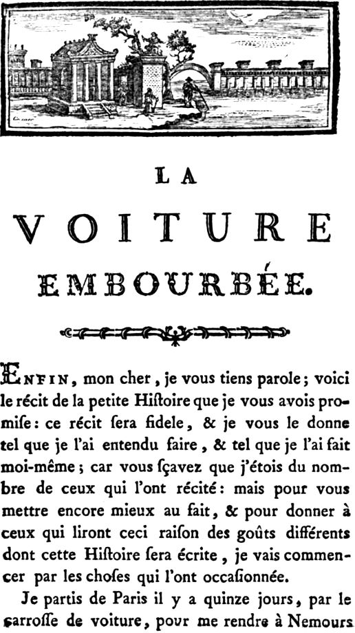 First page of La Voiture Embourbée (1714) by Pierre de Marivaux (1688-1763)